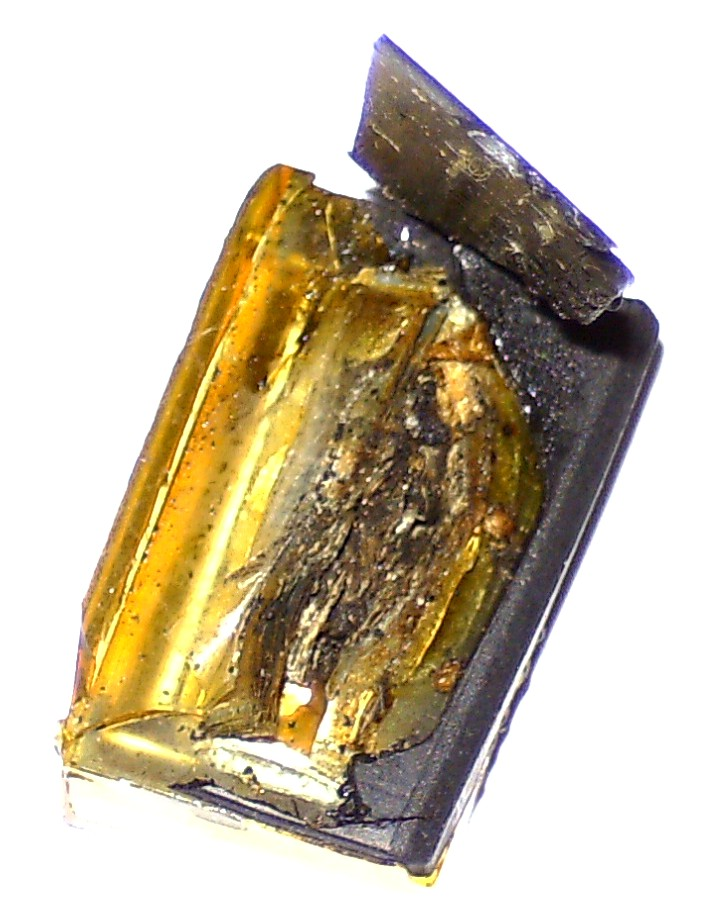 Im normalen Betrieb geborstener Kunststofffolien-Kondensator, Klasse X2